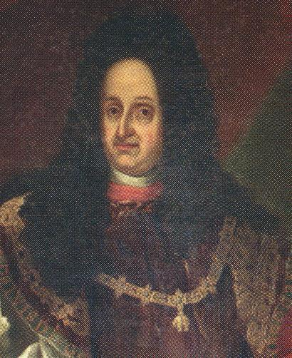 Václav Norbert Oktavian Kinský